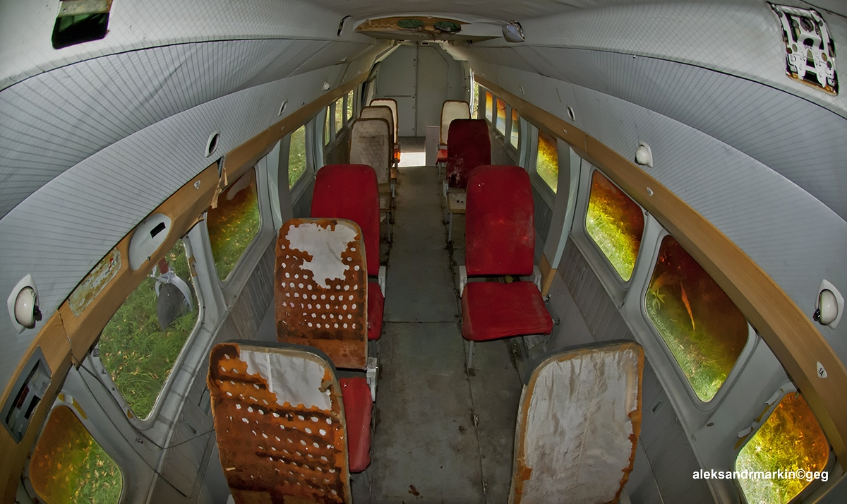 Beriev Be-32 CCCP-67209